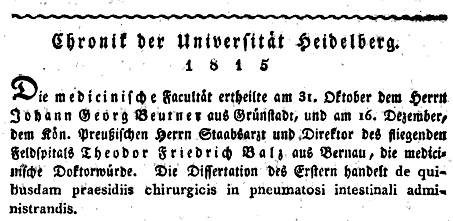 Eintrag zur Promotion des Arztes Johann Georg Beutner (1788-1859) aus Grünstadt, an der Universität Heidelberg